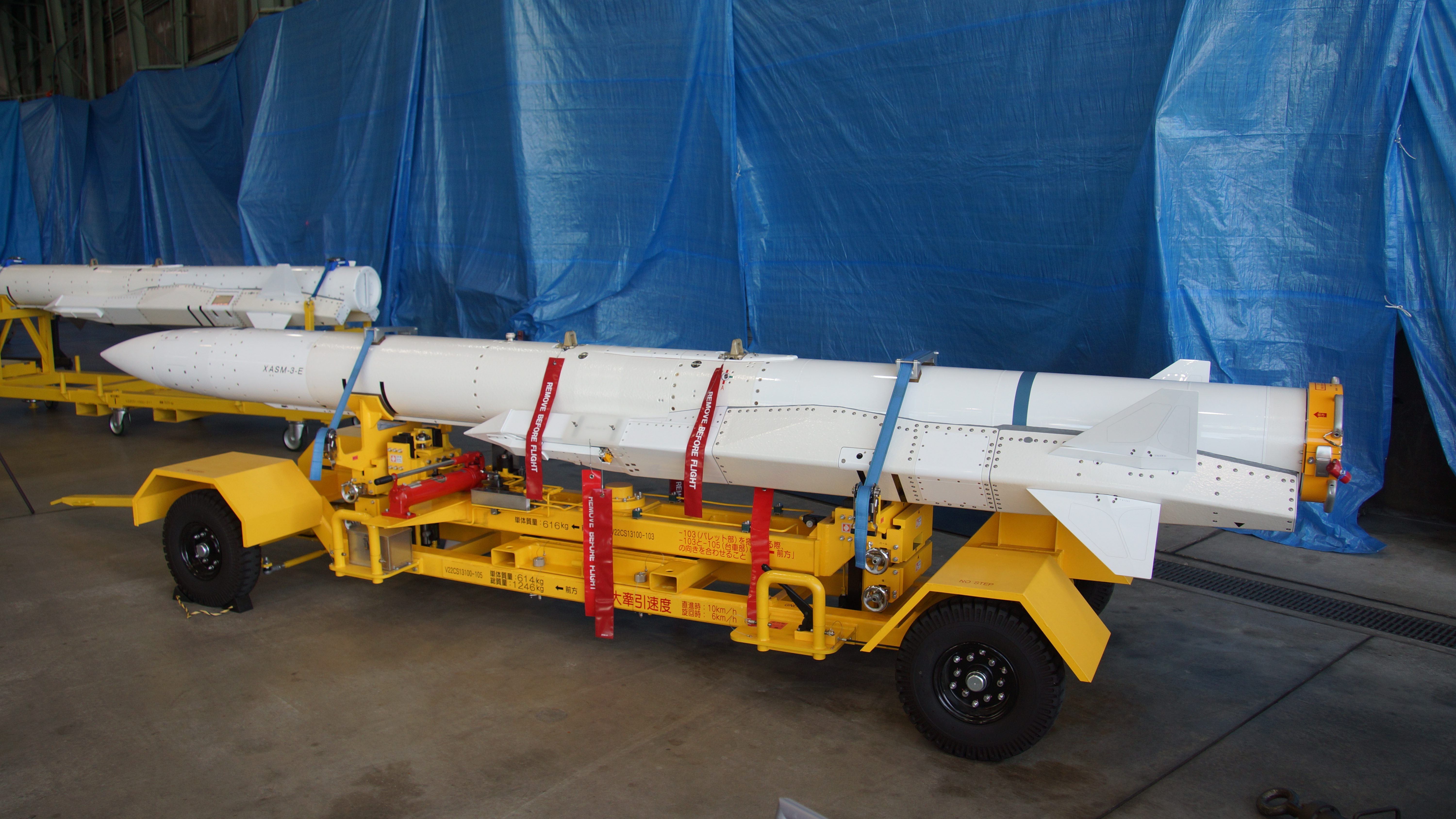 航空自衛隊 新空対艦誘導弾XASM-3（E型） 左後部。2017年11月19日 岐阜基地にて。